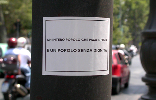 Aufkleberaktion